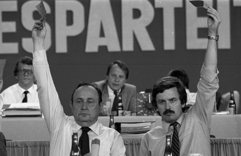 Außerordentlicher Bundesparteitag der FDP in Freiburg.